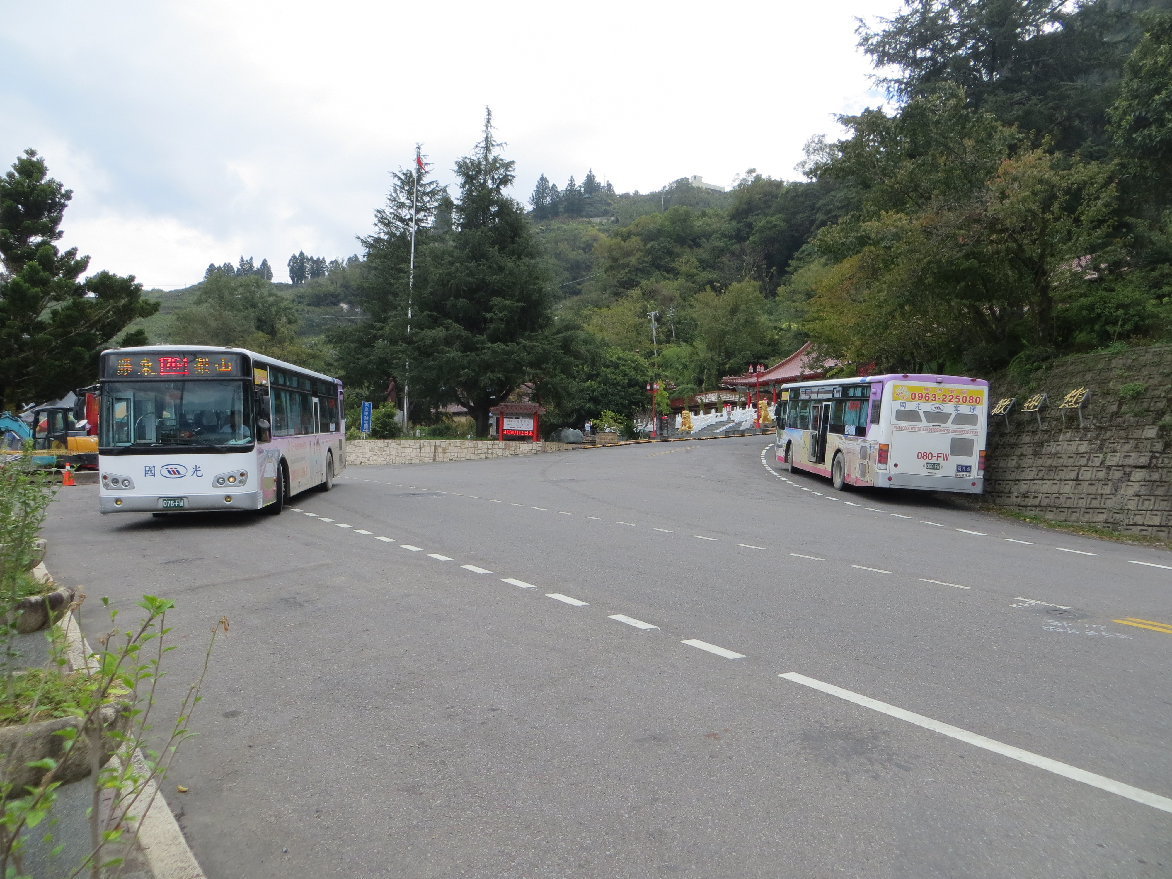 2015年10月7日，梨山賓館前圓環兩側的兩國光車輛，皆為連繫宜蘭─梨山大眾交通的用車，屬於梨山對外交通的主力。左為076-FW，即將負責1764路線下山赴羅東；右為080-FW，稍後以1751路線返回宜蘭。